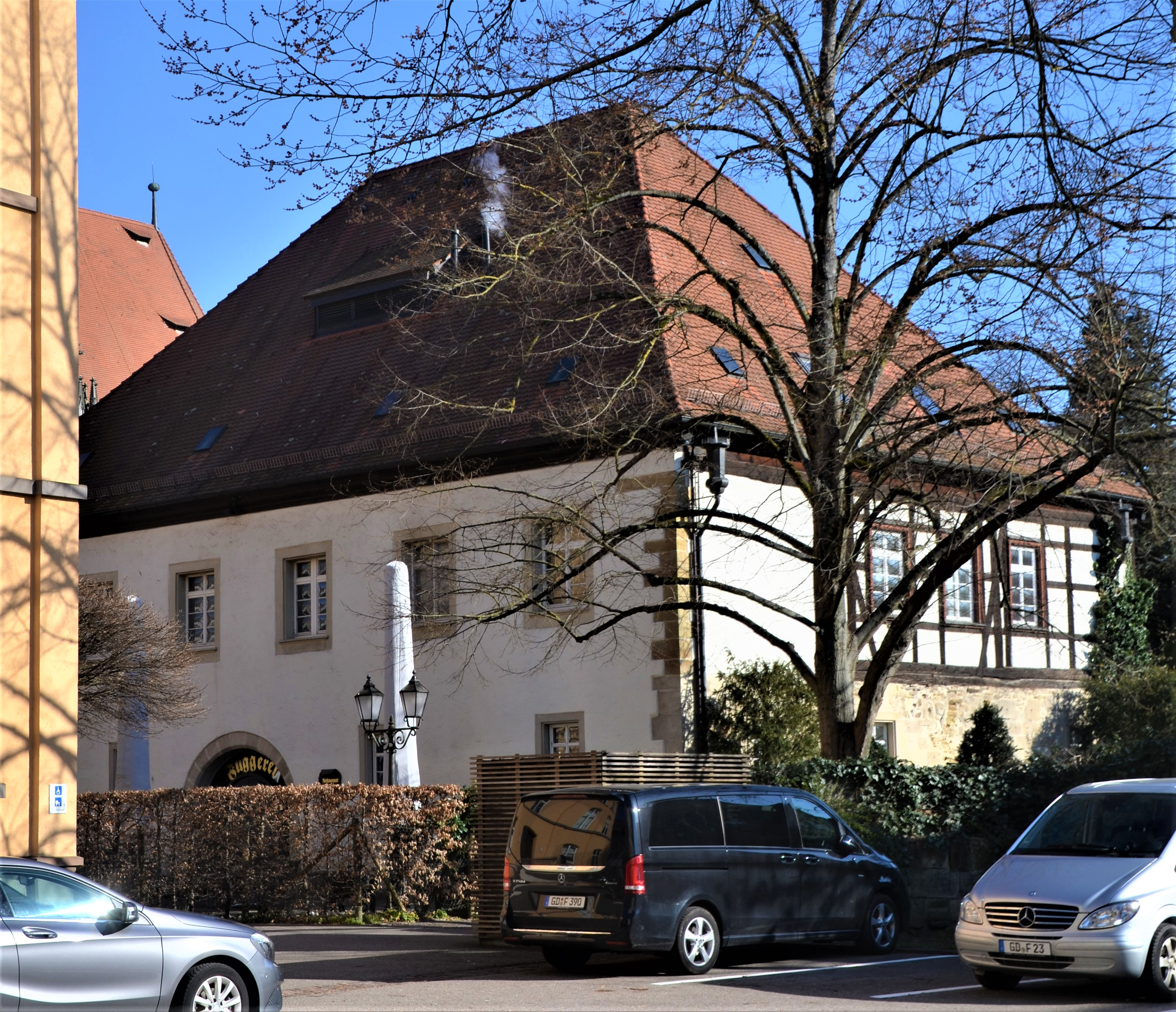 Fuggerei vom Platz vor dem Klösterle in Schwäbisch Gmünd aufgenommen